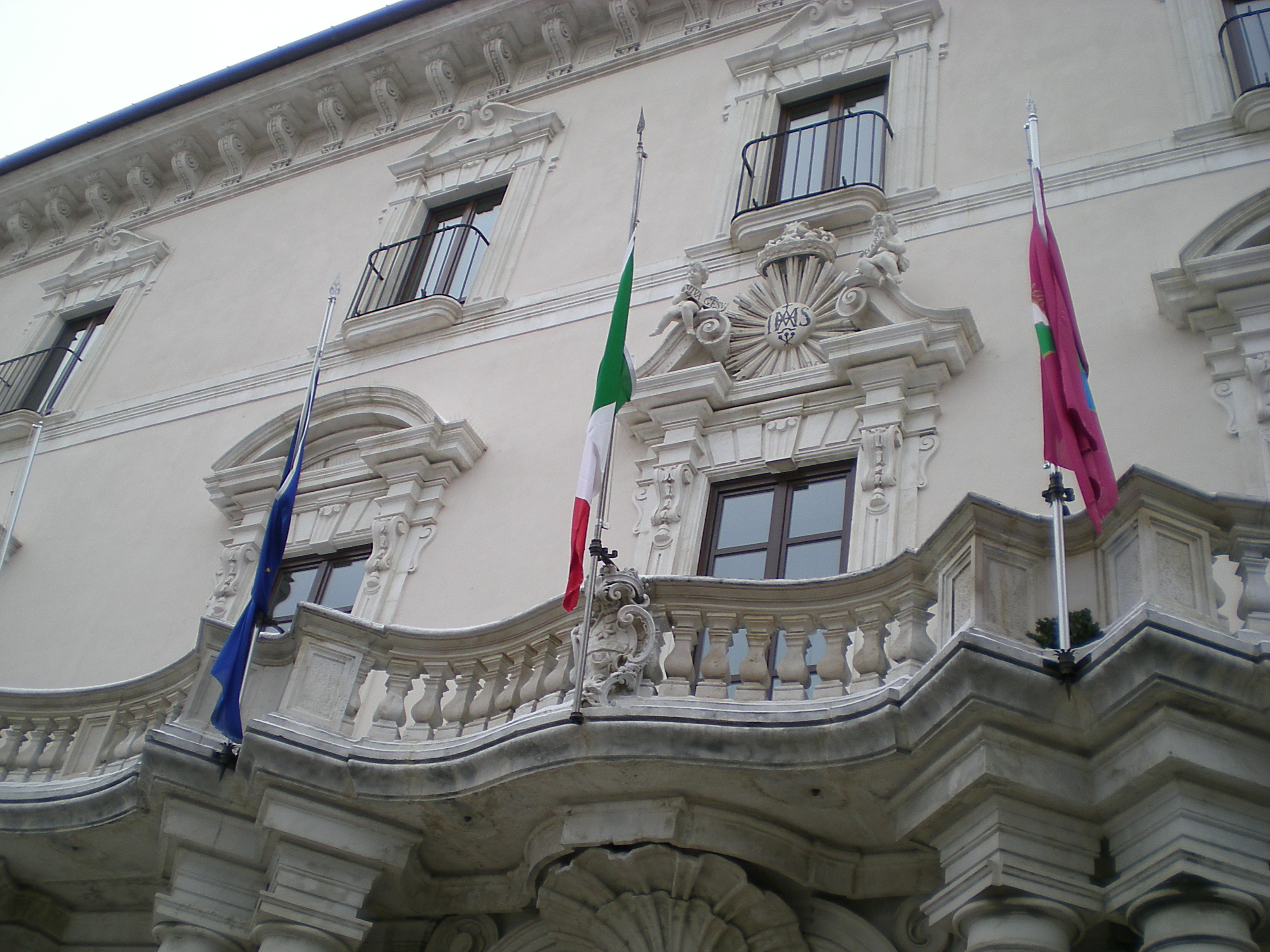 Palazzo Centi, Piazza Santa Giusta, L'Aquila